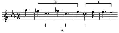 GNU-FDL, selbst erstellt